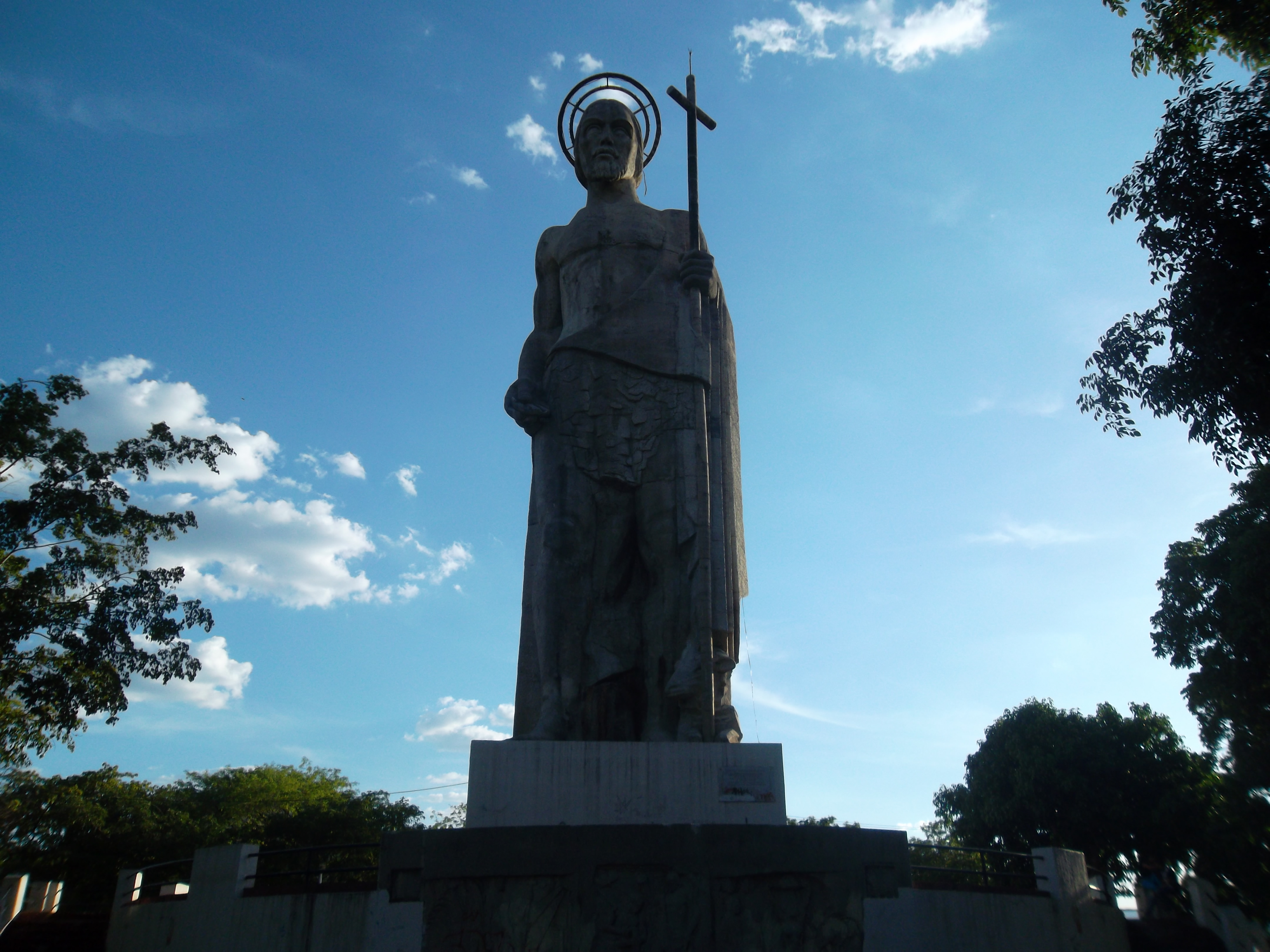 monumento a san juan bautista, el "sanjuanote" en la plaza bolivar de san juan de los morros, edo. Guarico.